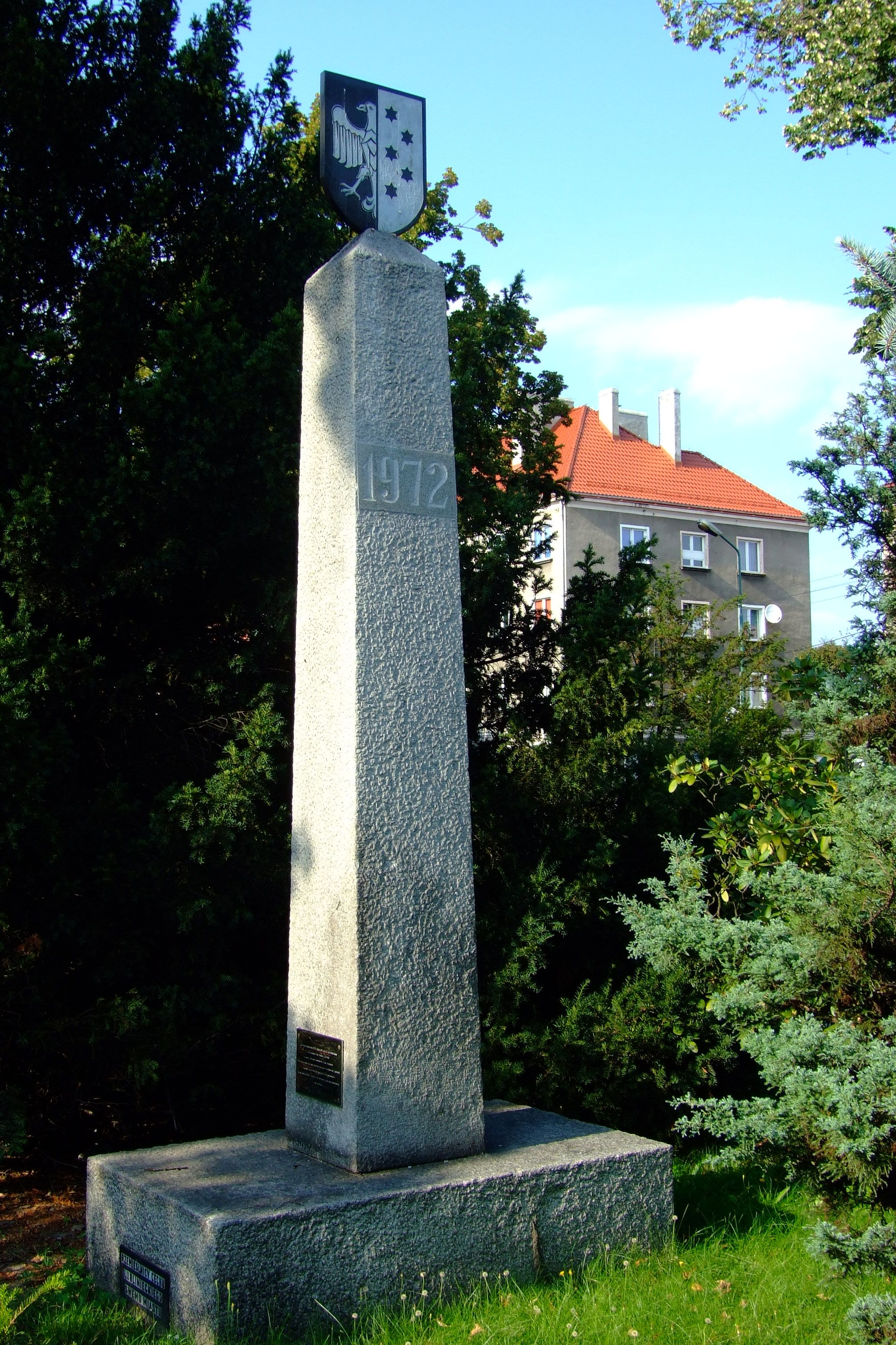 Obelisk przed urzędem miasta w Lublińcu